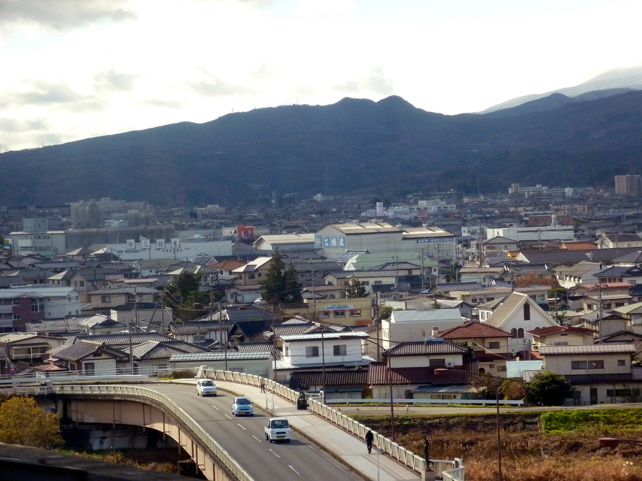 笹森山（ささもりやま）は、福島県福島市松川町水原にある標高649.9mの山である。